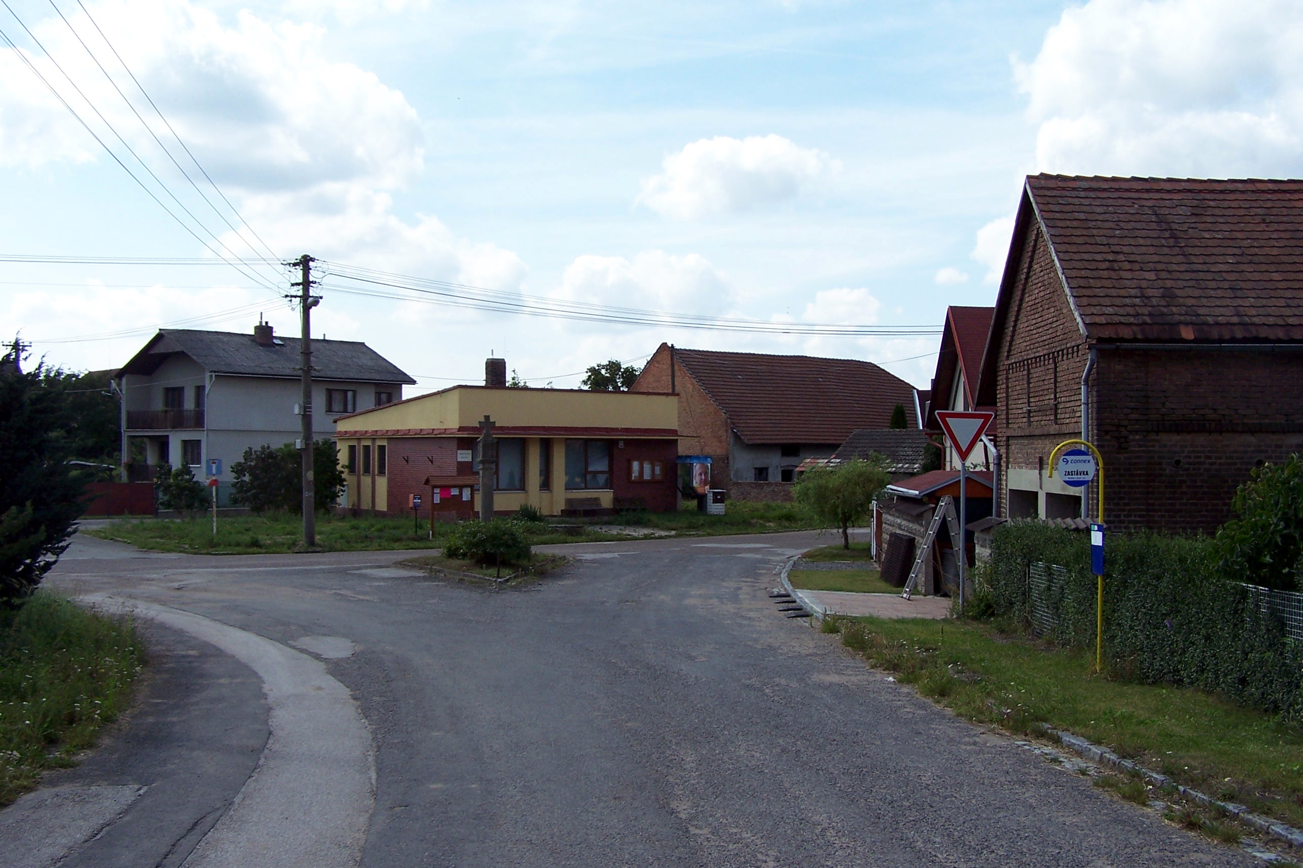 Náves v Benátkách. Loc: 50°18'41.578"N, 15°44'3.707"E